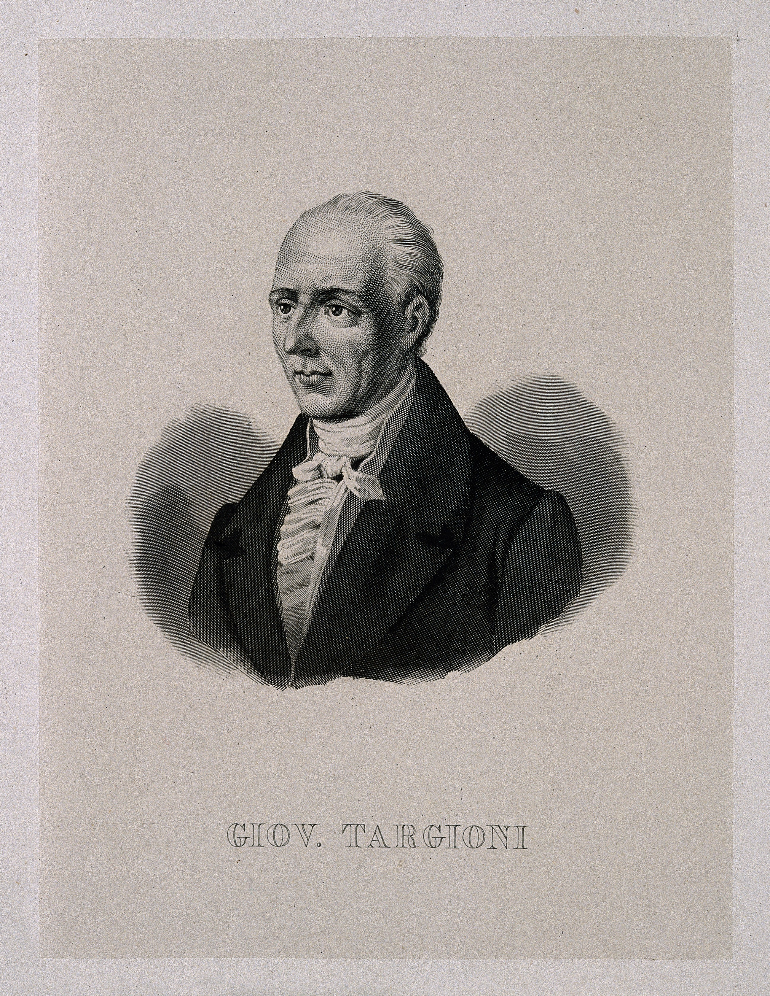 Giovanni Targioni-Tozzetti. Line engraving. Iconographic Collections Keywords: portrait prints; engravings; Giovanni Targioni-Tozzetti